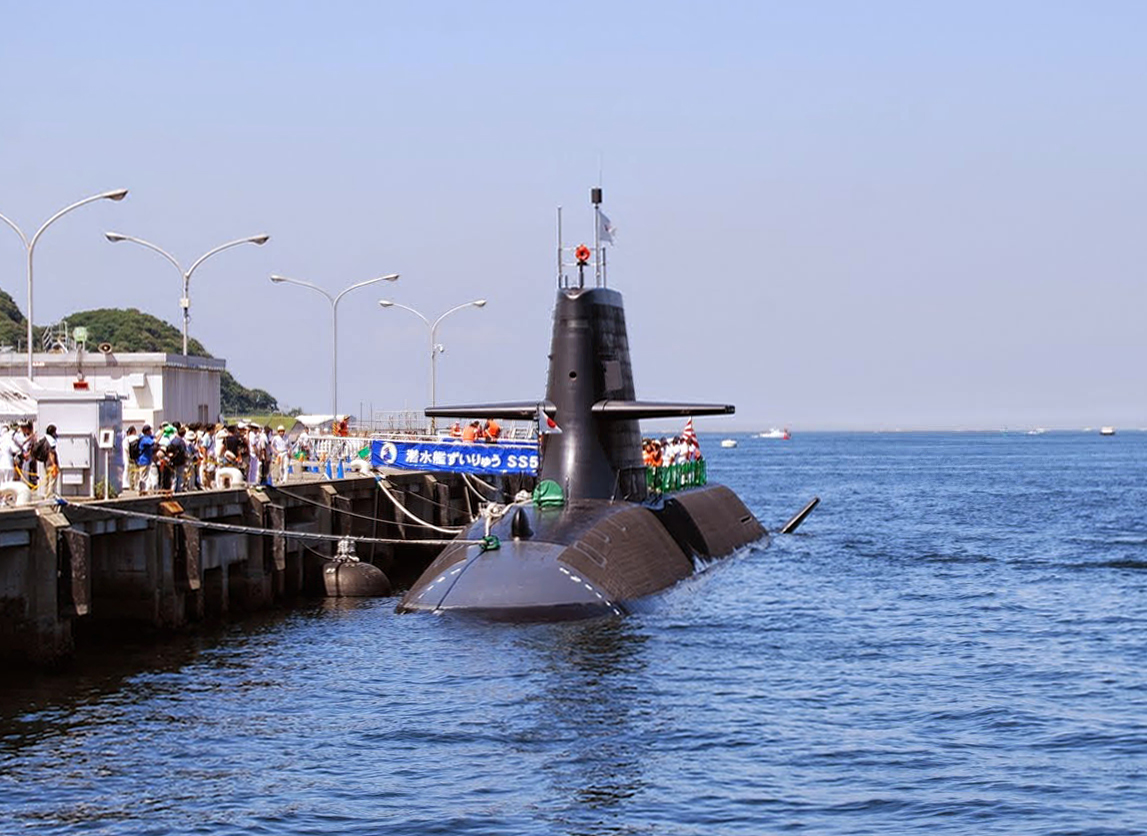 横須賀・吉倉桟橋で公開中の潜水艦ずいりゅう。サマーフェスタ2014にて。